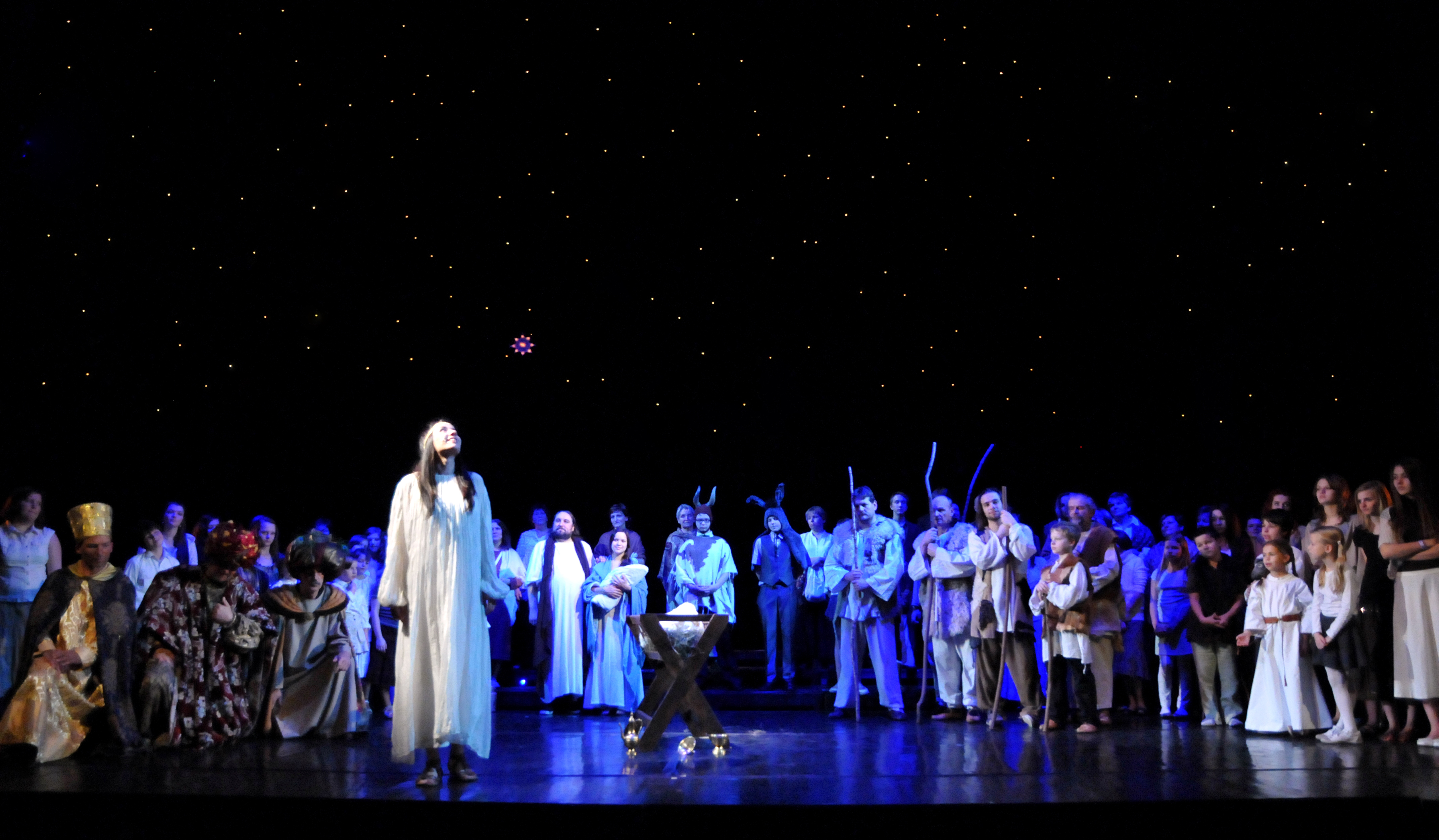 Pavel Helebrand: Vánoční oratorium Jezulátko (Národní divadlo moravskoslezské, 2012)